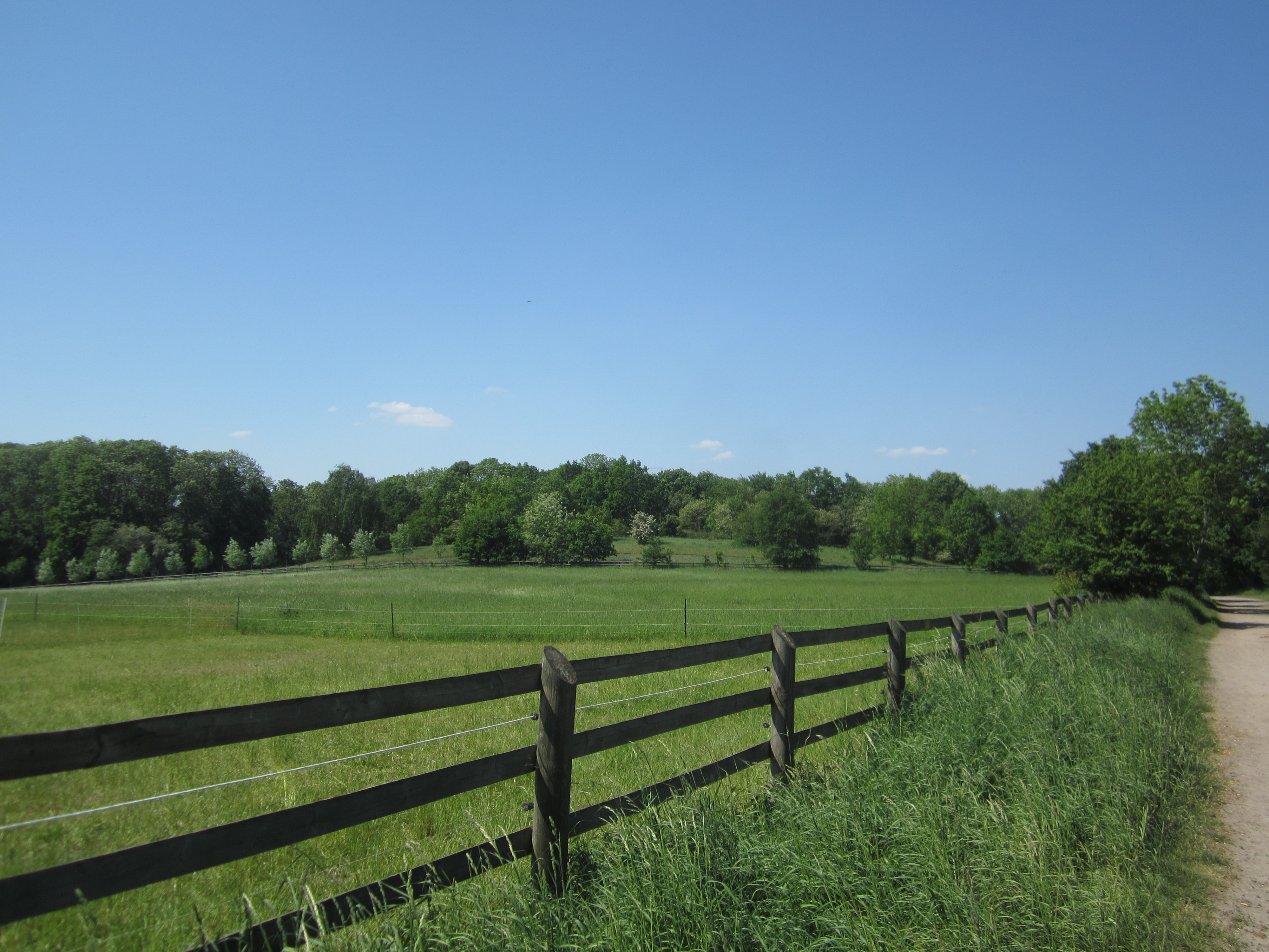 Steinertsberg, Naturdenkmal, Landschaftsschutz-Gebiet Parthenaue.